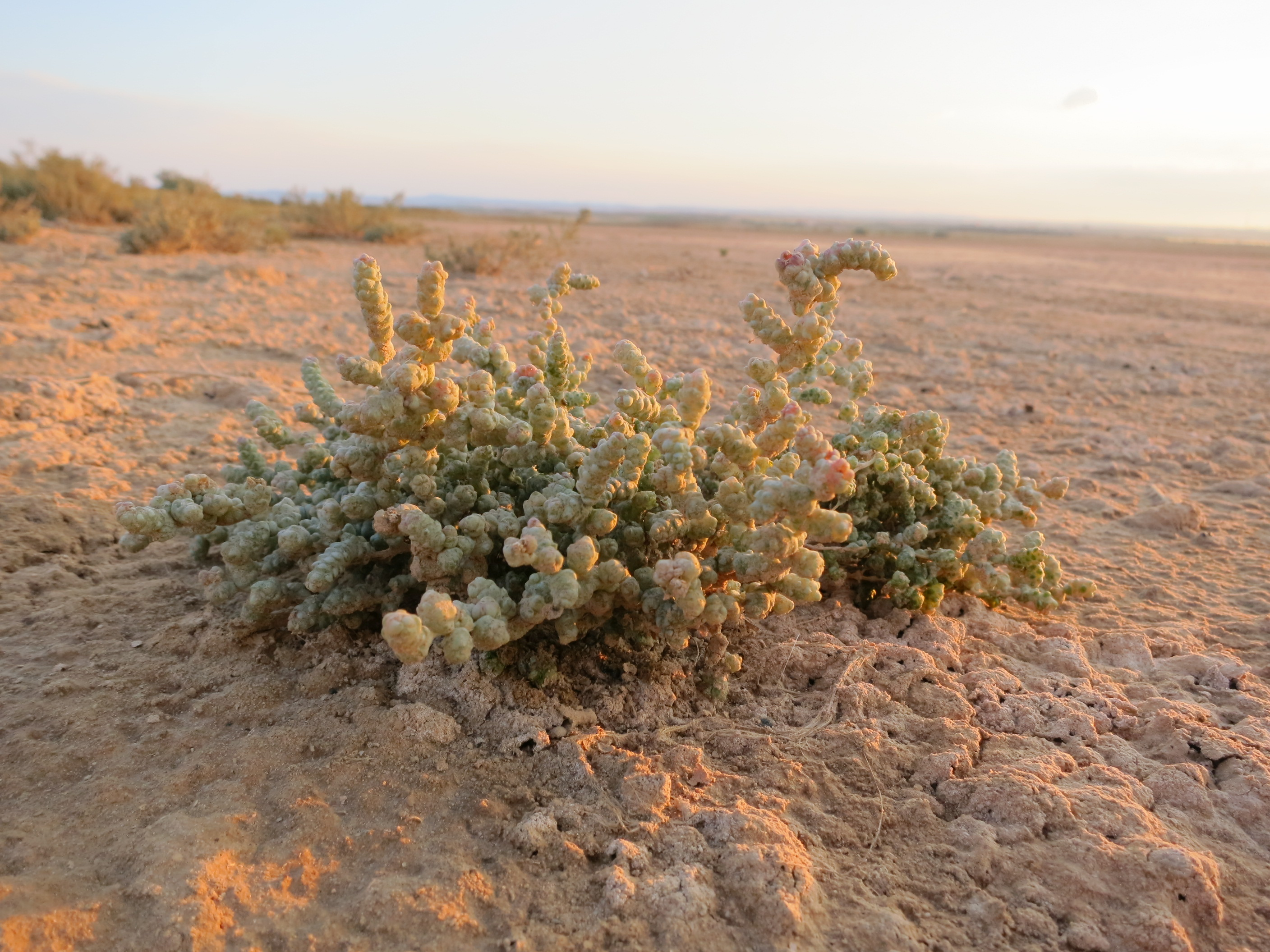 Halopeplis Amplexicaulis. La Salada Grande. Alcañiz. Teruel. Aragón. España.